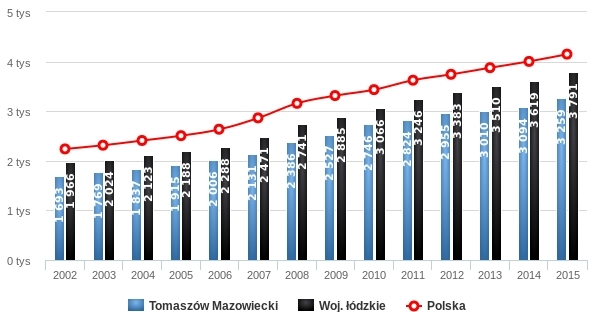 Wynagrodzenie, Tomaszów Mazowiecki, 2015